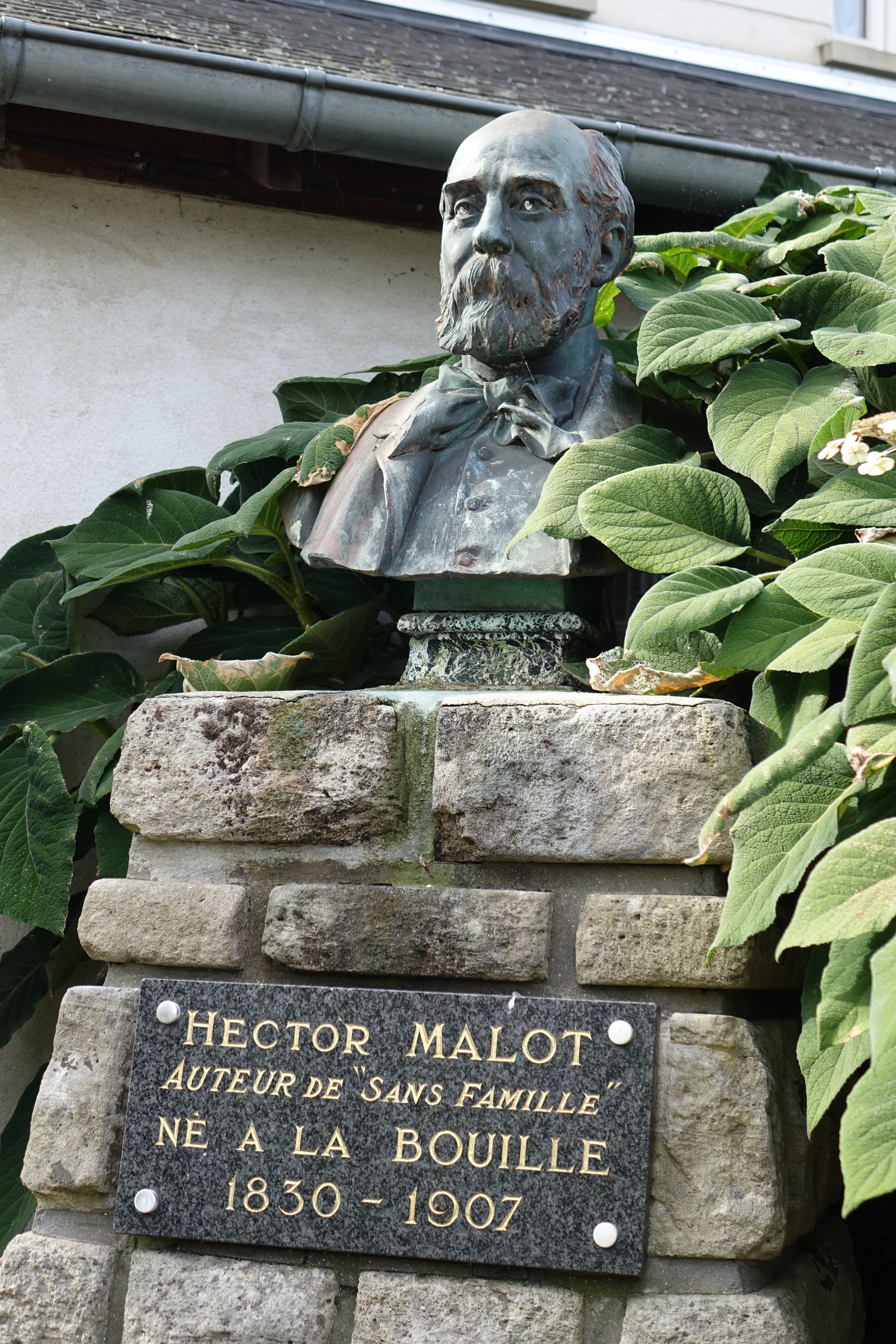 Buste d'Hector Malot par Henri Chapu à La Bouille, Seine-Maritime, France